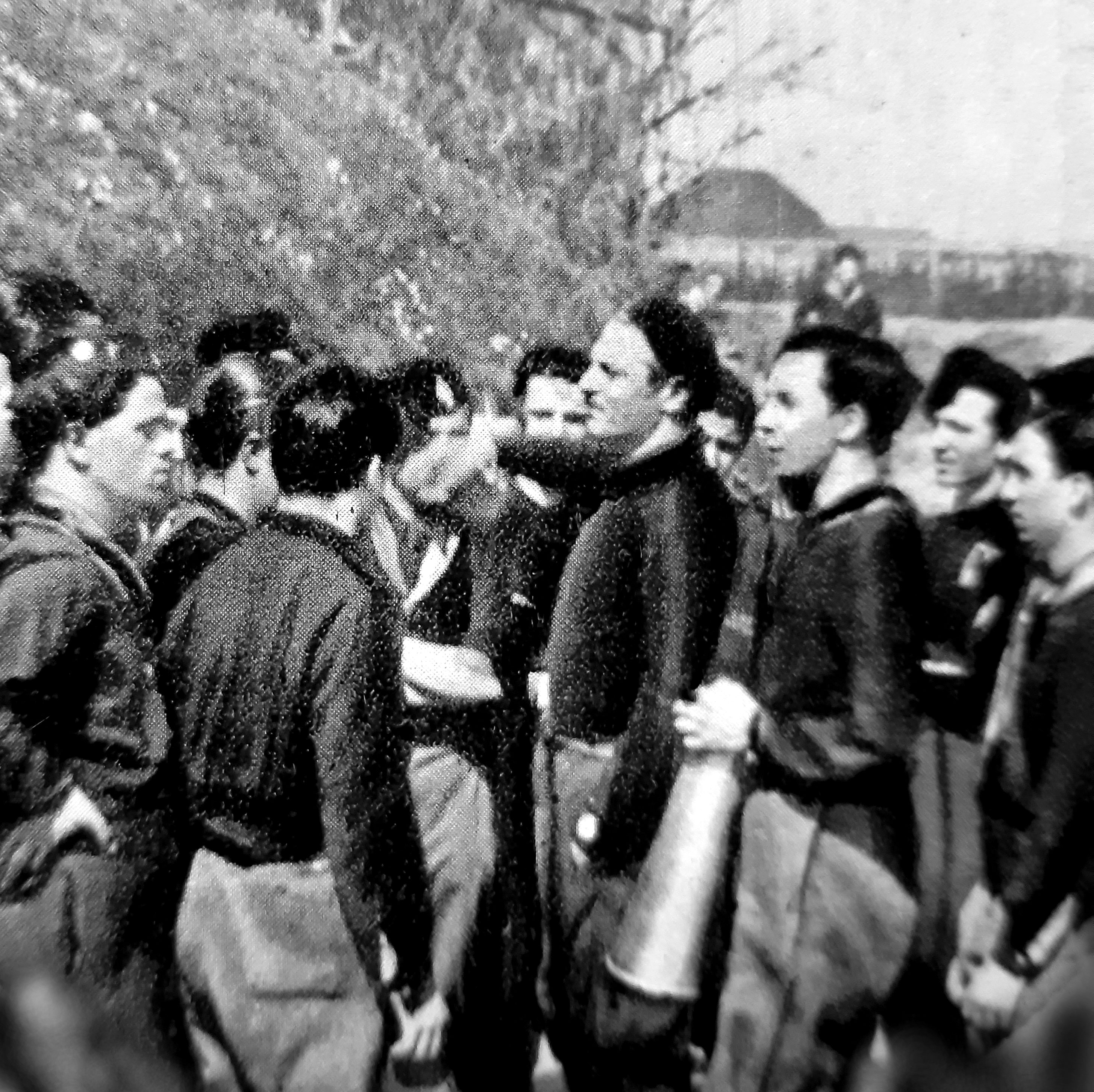 Alessandro Blasetti ad una manifestazione del GUF, Roma, 1931